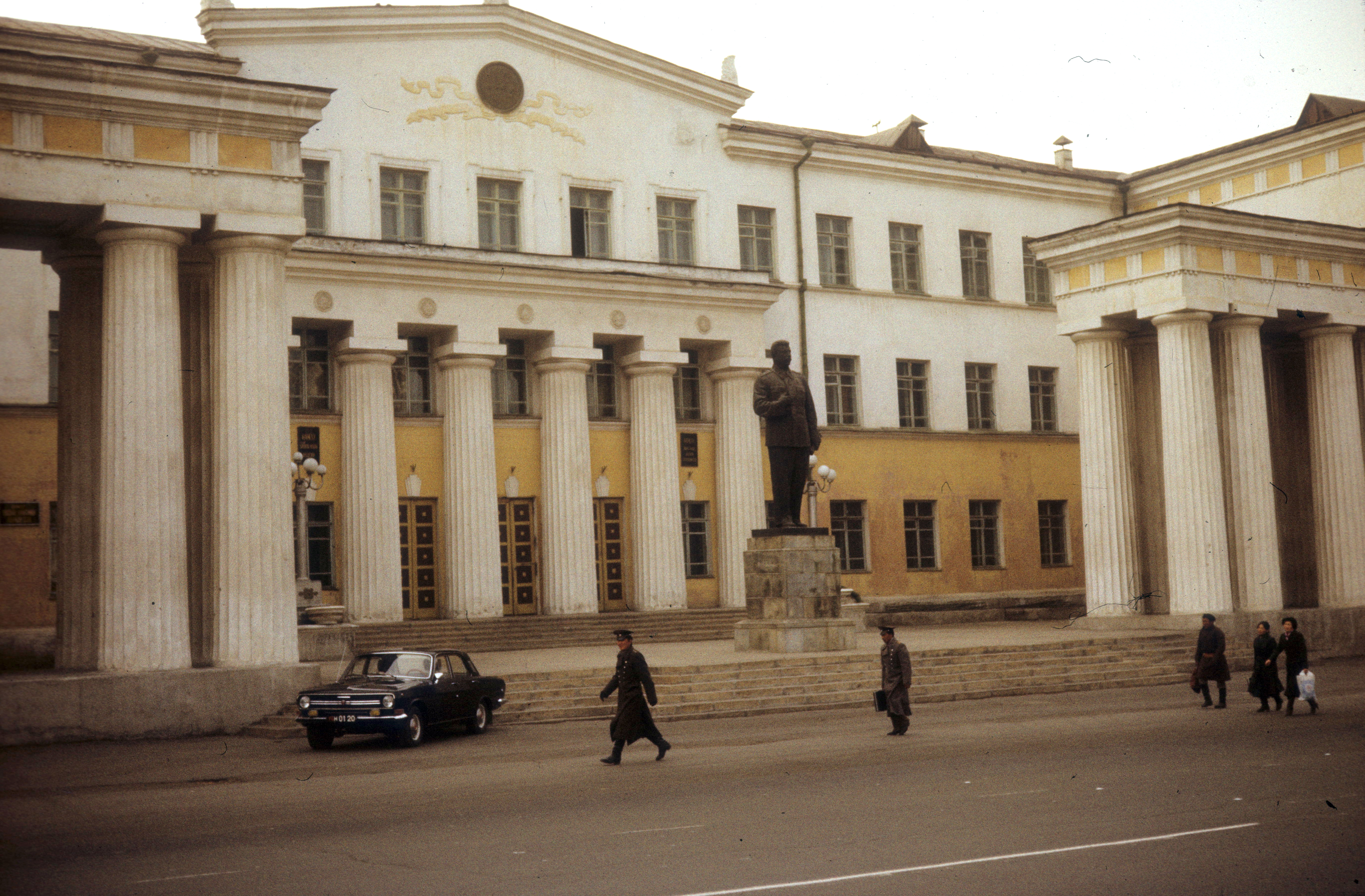 Mongol Nemzeti Könyvtár, előtérben a Sztálin emlékmű (Nyikolaj V. Tomszkij, 1951.). Tags: colorful Title: Mongol Nemzeti Könyvtár, előtérben a Sztálin emlékmű (Nyikolaj V. Tomszkij, 1951.).